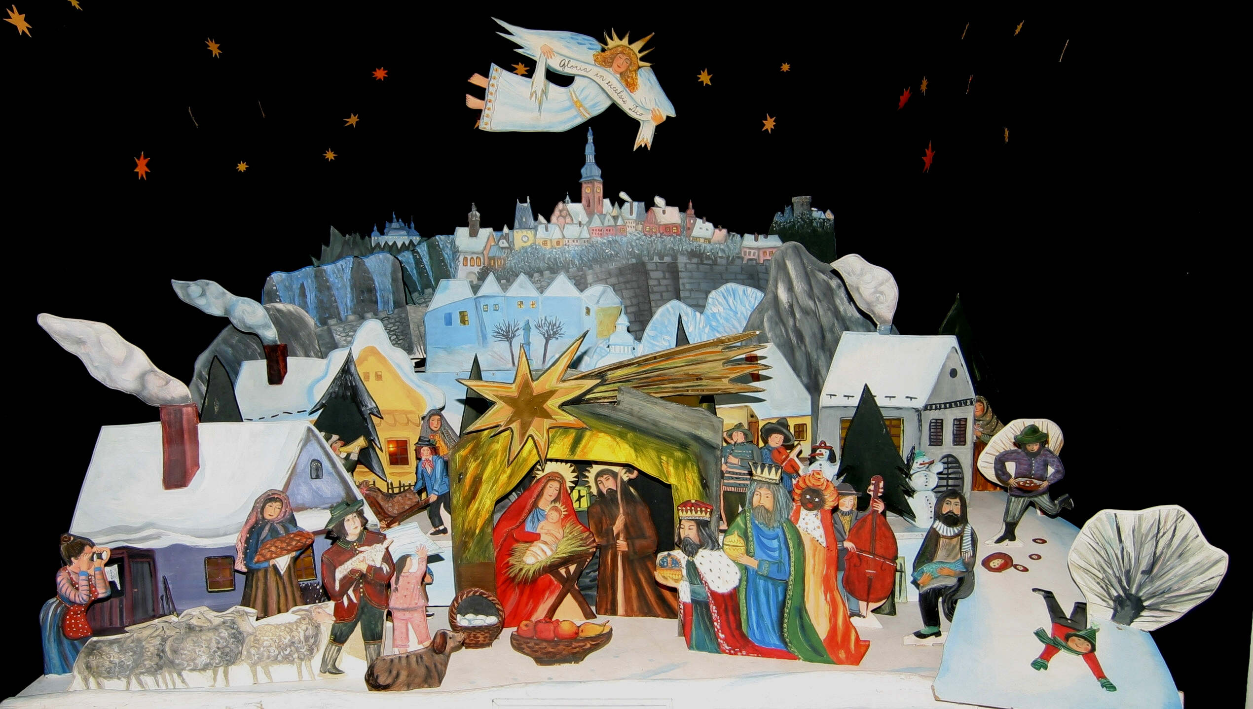 autor Máša Valtrová